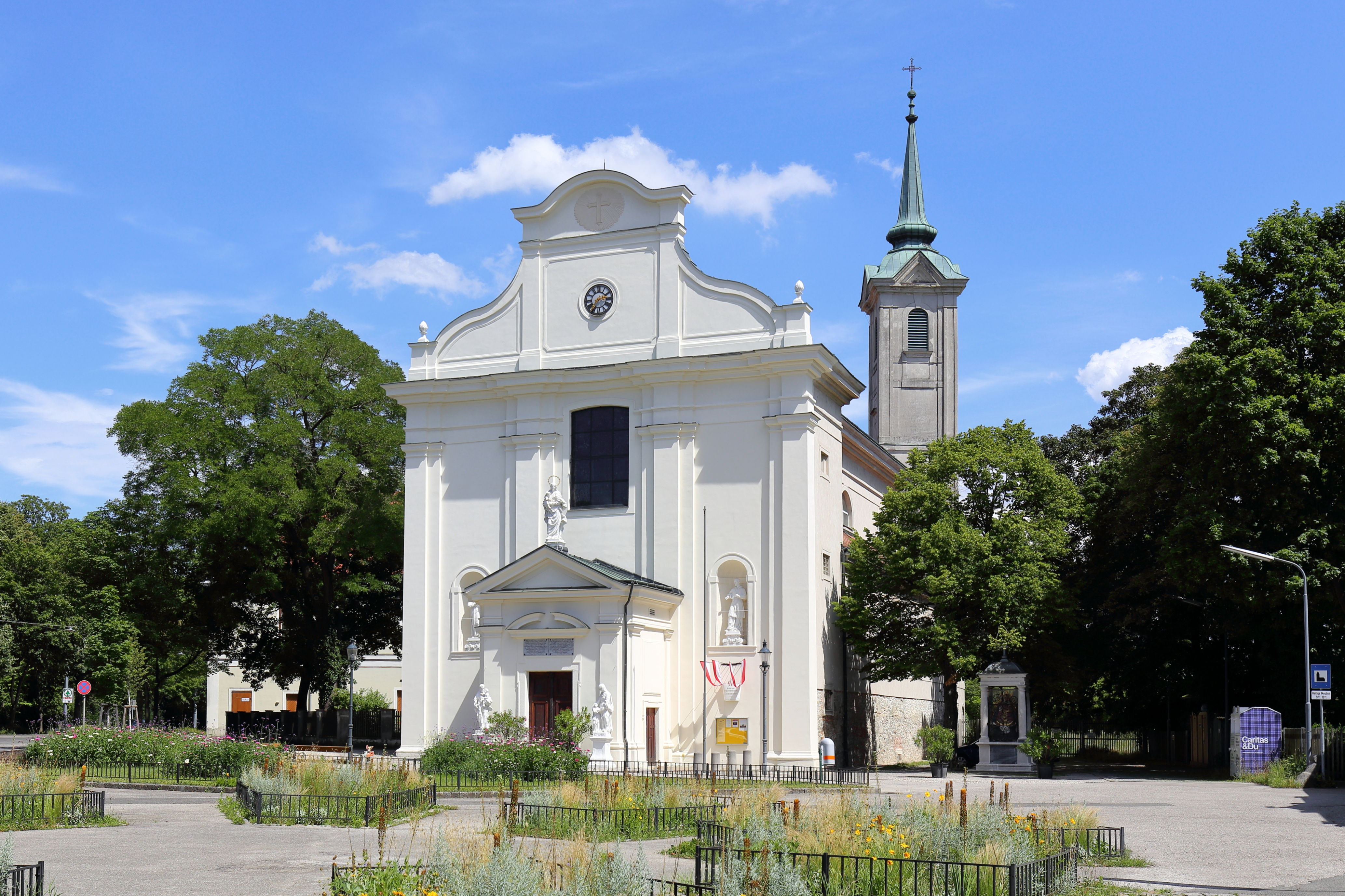 Westansicht der Pfarr- und Wallfahrtskirche Mariabrunn in Hadersdorf, ein Bezirksteil des 14. Wiener Gemeindebezirkes Penzing.Die Kirche wurde von dem Baumeister Domenico Carlone von 1639 bis 1655 im Zuge der Klostergründung durch die Augustiner-Barfüßer (Barfüßerkloster Mariabrunn) erbaut.